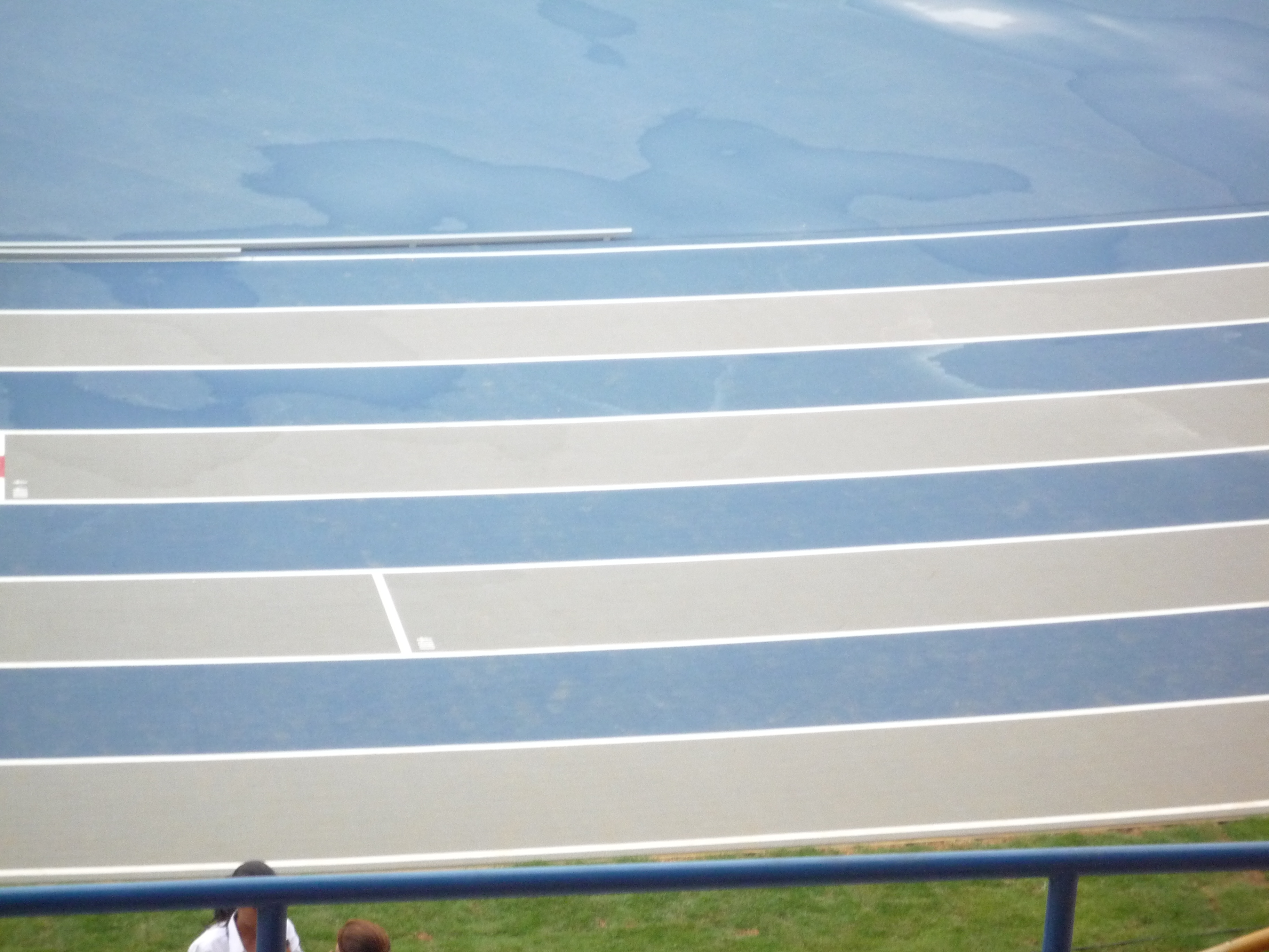 Pista de Atletis, Estadio Rommel Fernández, Panamá.